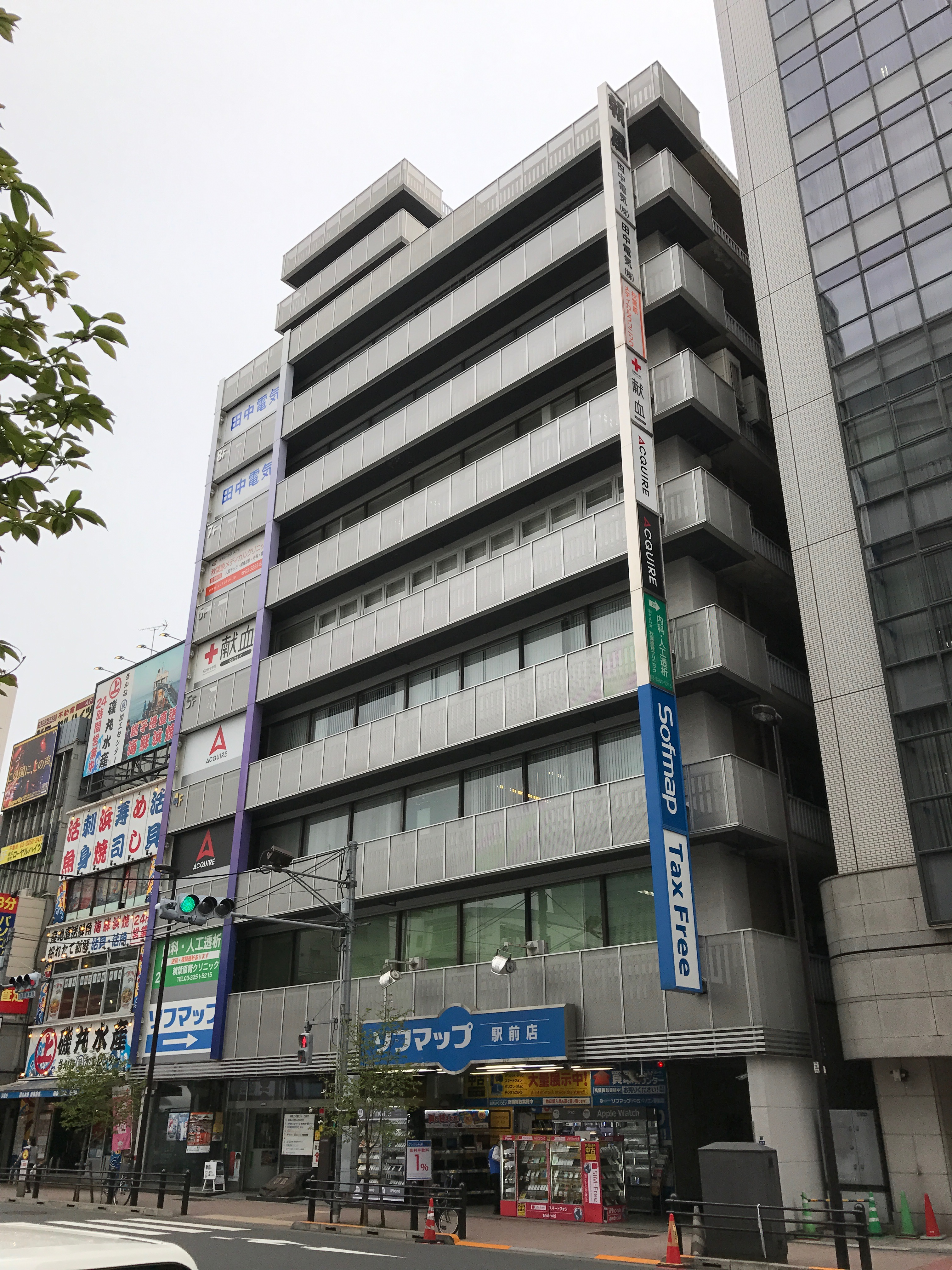 外神田1丁目16-9 朝風二号館ビル